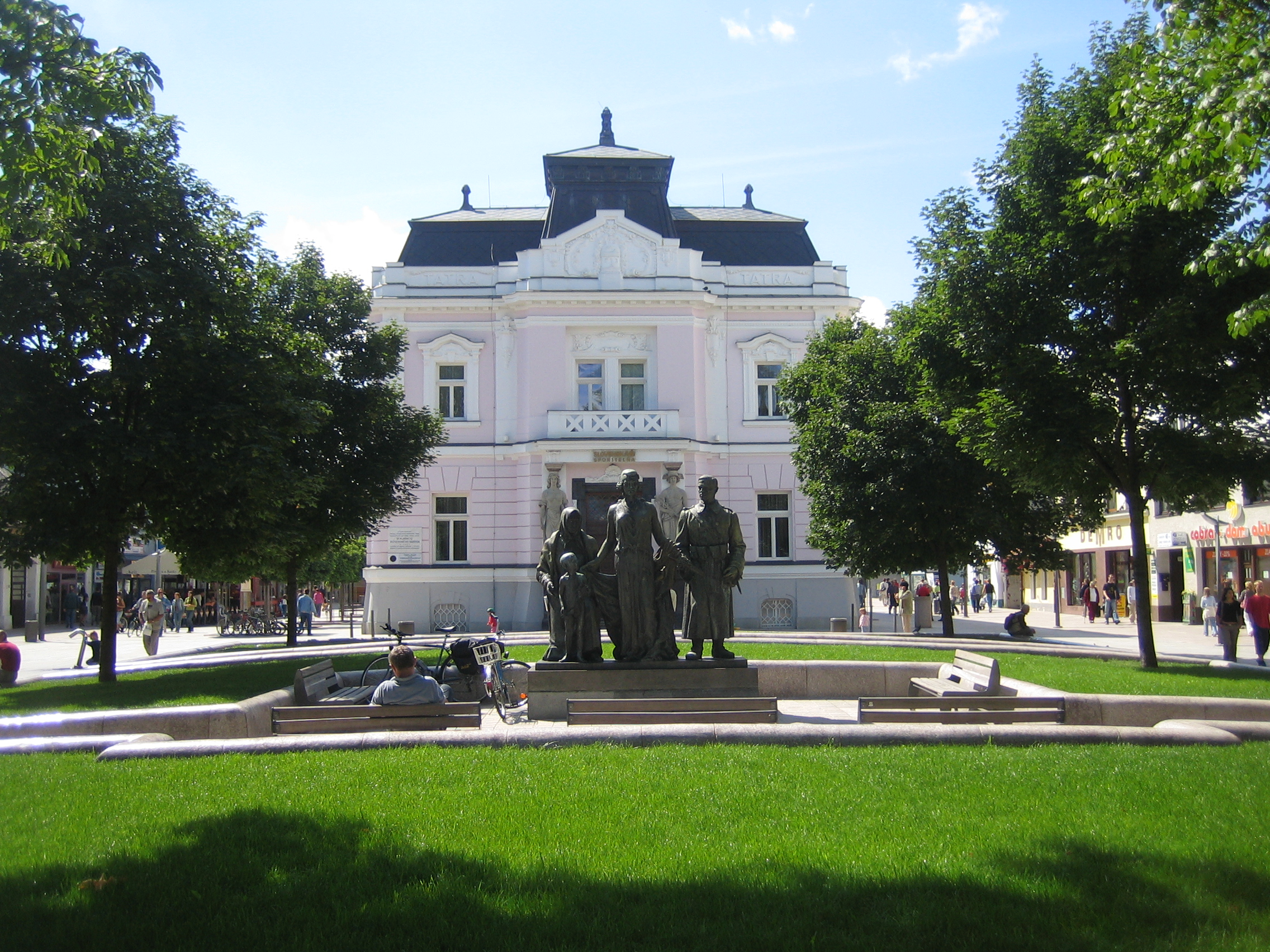 Martin (SVK), plaza